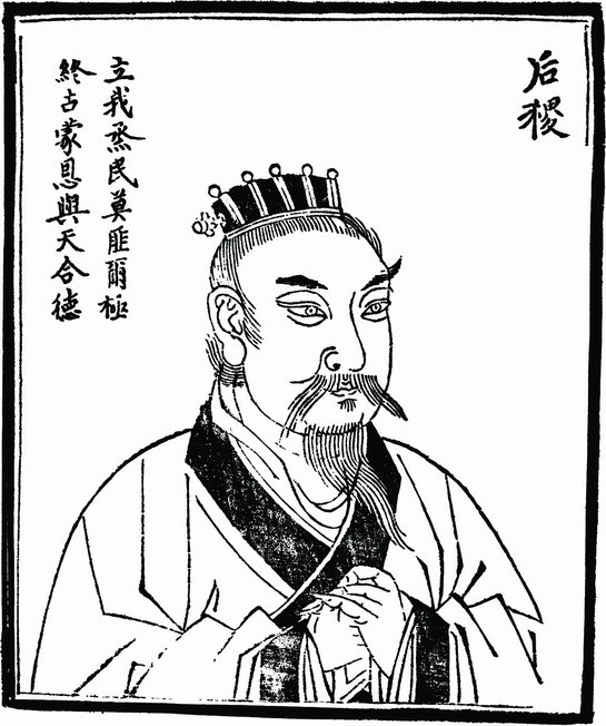 中文（中国大陆）: 后稷画像。